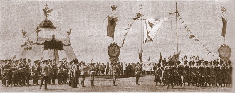 Празднование 300-летия дома Романовых в Костроме. Фото: журнал "Нива", № 24 за 1913 год.